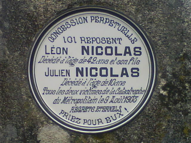 Plaque épitaphe en porcelaine de la tombe de Léon et Julien Nicolas, victimes de la catastrophe du métro parisien à la station Couronnes, le 9 août 1903, au cimetière de Châlus, Haute-Vienne, France.